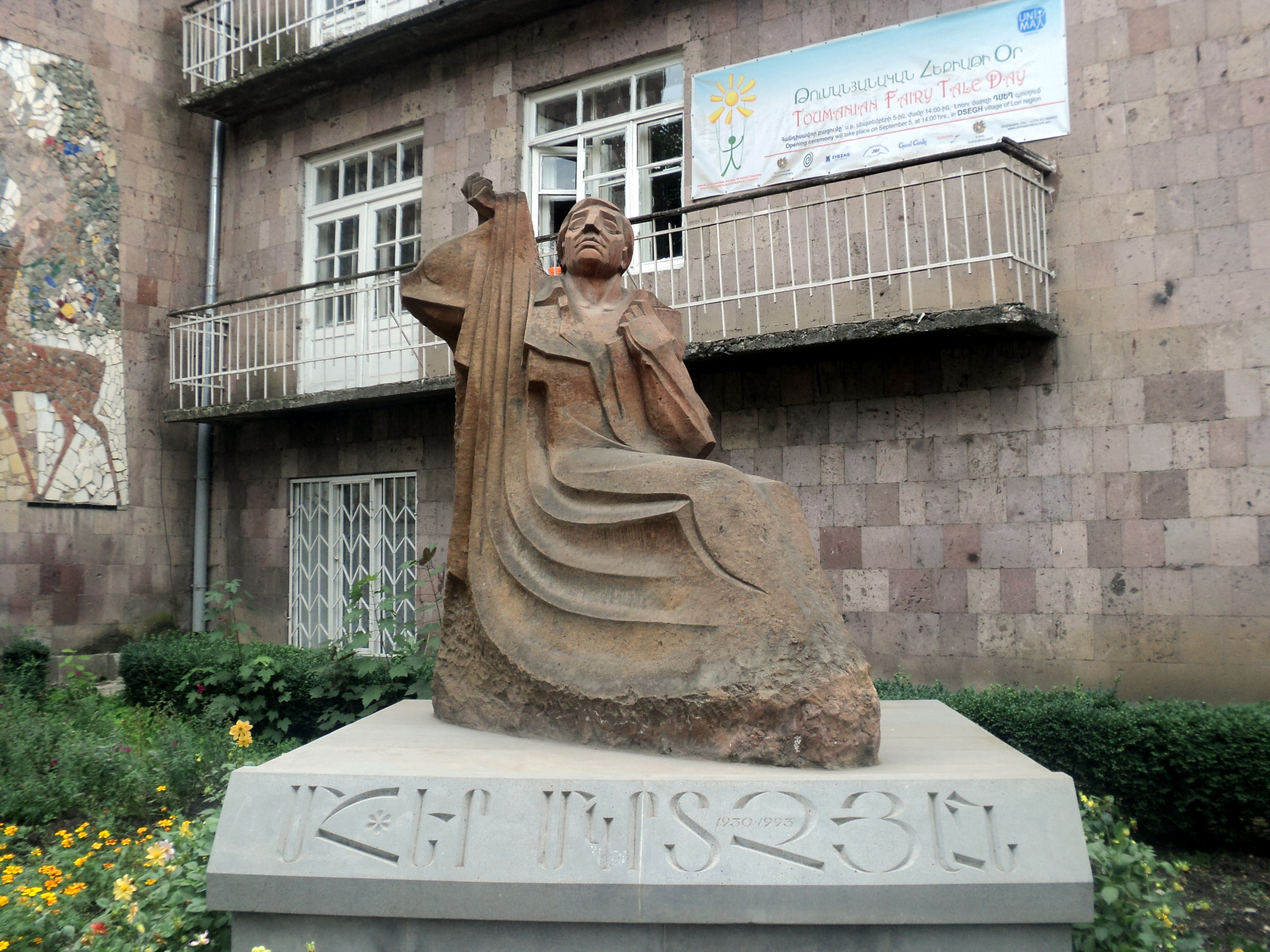 Մհեր Մկրտչյանի արձանը Վանաձորի Տիգրան Մեծ պողոտայում